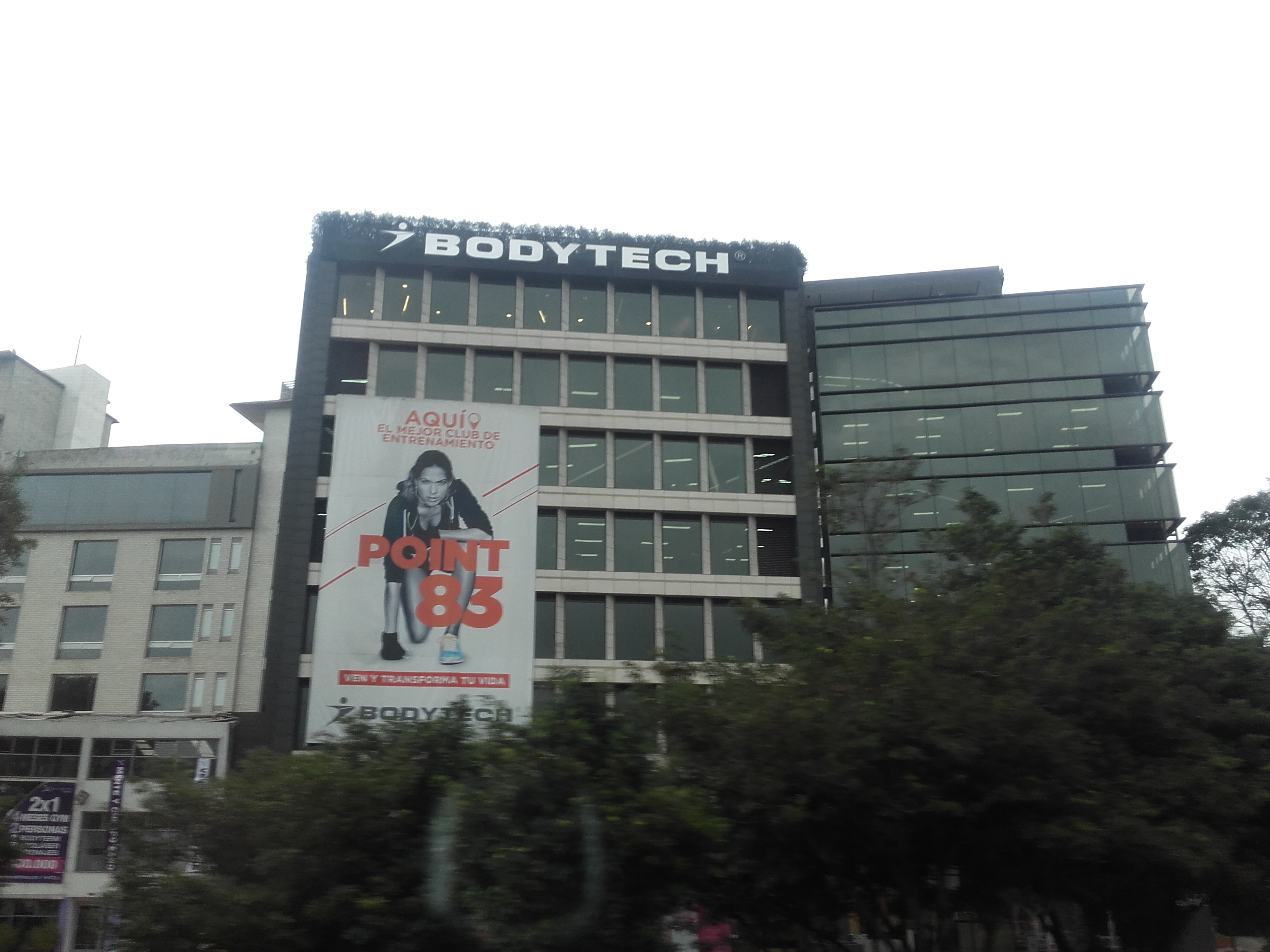 jdkdkekdkdkdkdmdm